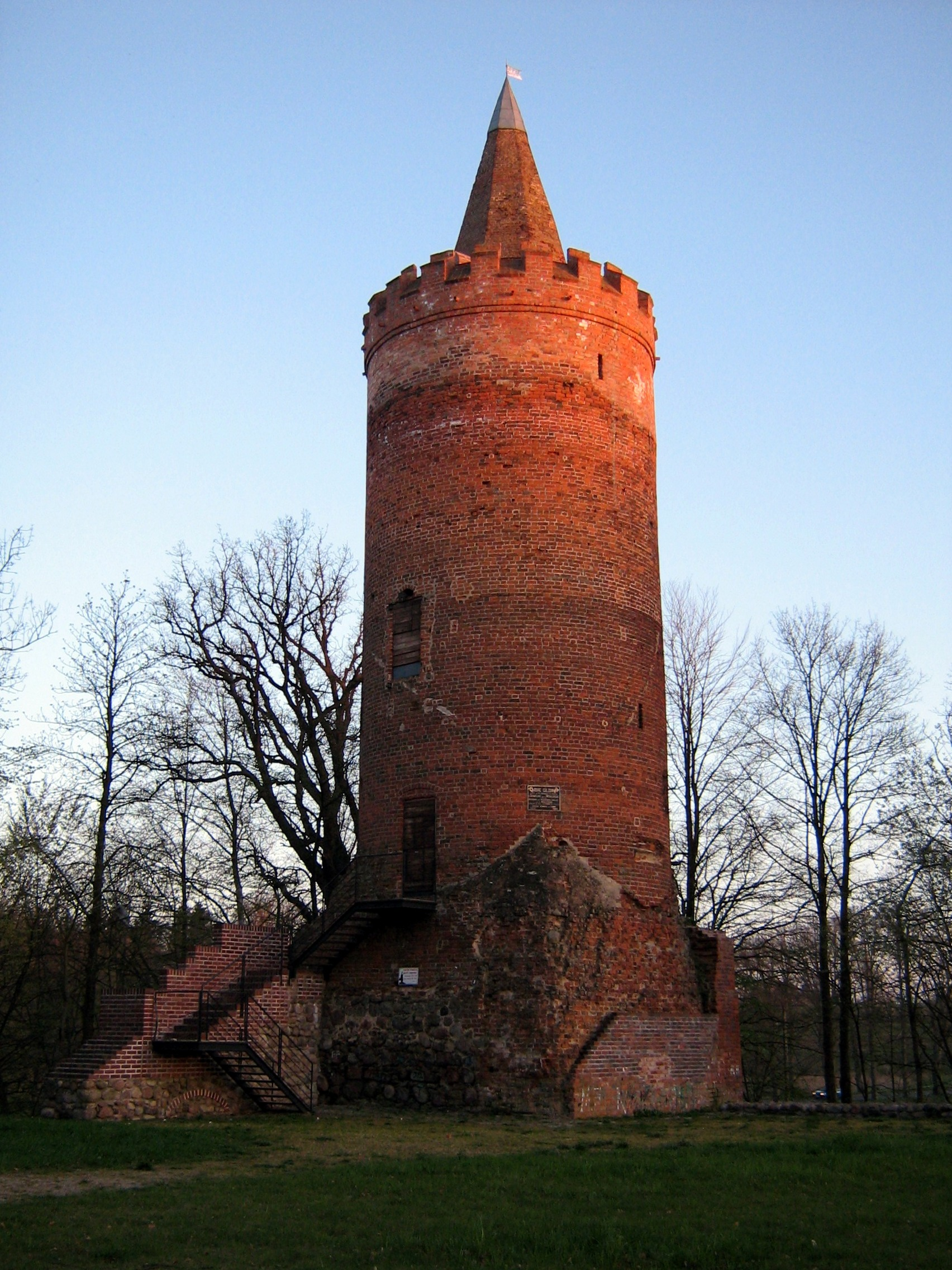 wieża znajdująca się w Golczewie.